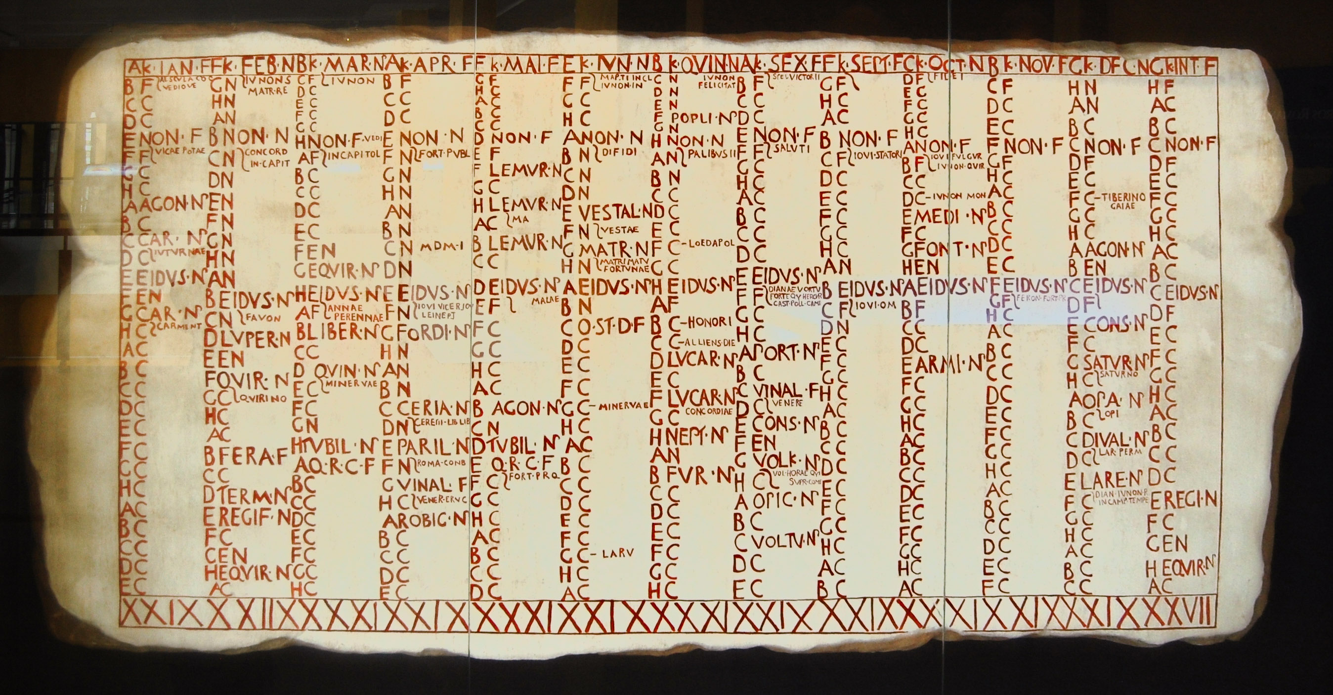 Reproducción del Calendario de Anzio (Fasti Antiates) del 84-55 a. C., expuesto en el Museo del Teatro romano de Caesaragusta. El original está en Roma, en el Museo Nacional de las Termas, y es anterior a la reforma de Julio César. Está pintado sobre un enlucido del que se hallaron unos 300 fragmentos en 1915.